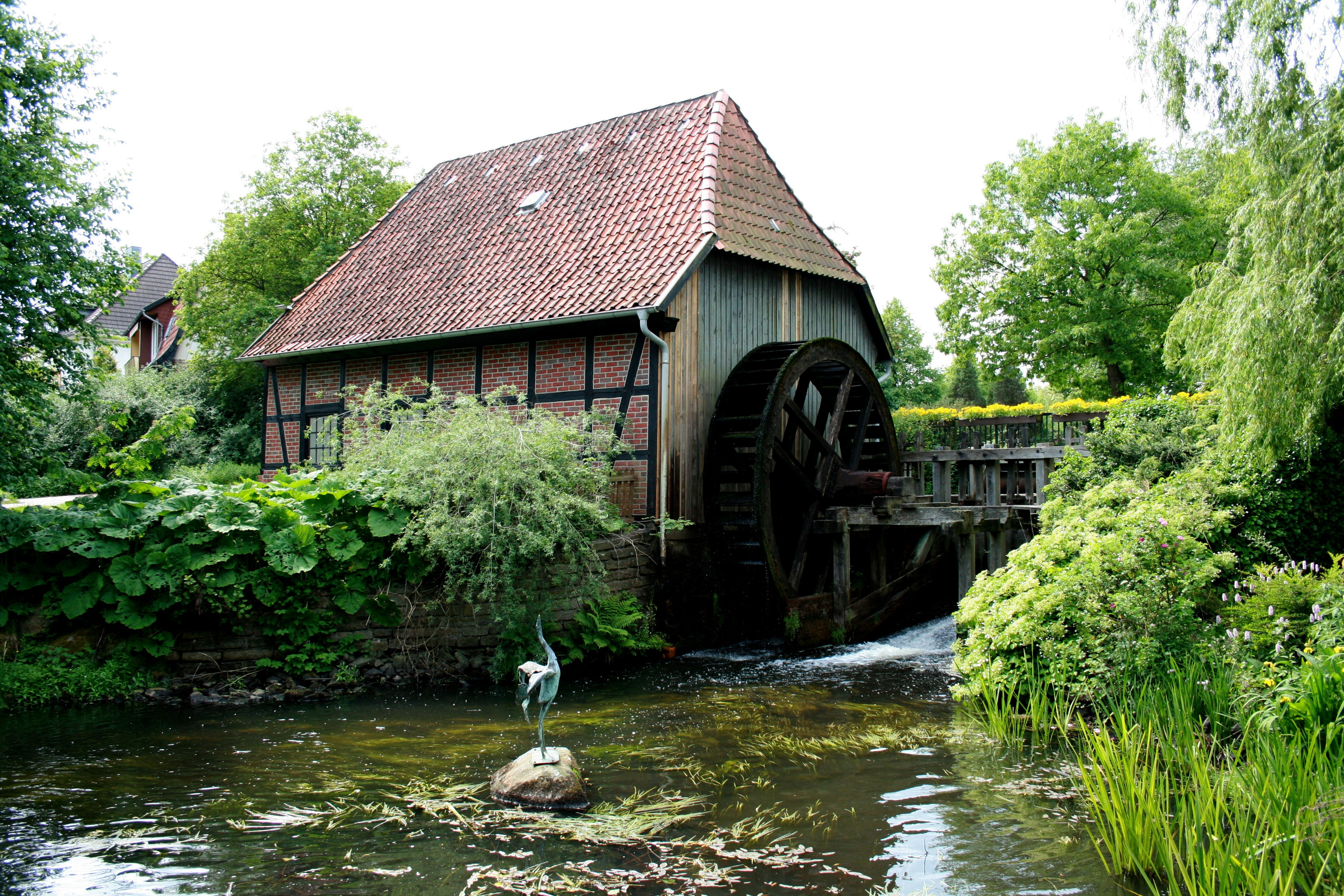 Wassermühle an der Örtze in Munster (Örtze), Lüneburger Straße 5